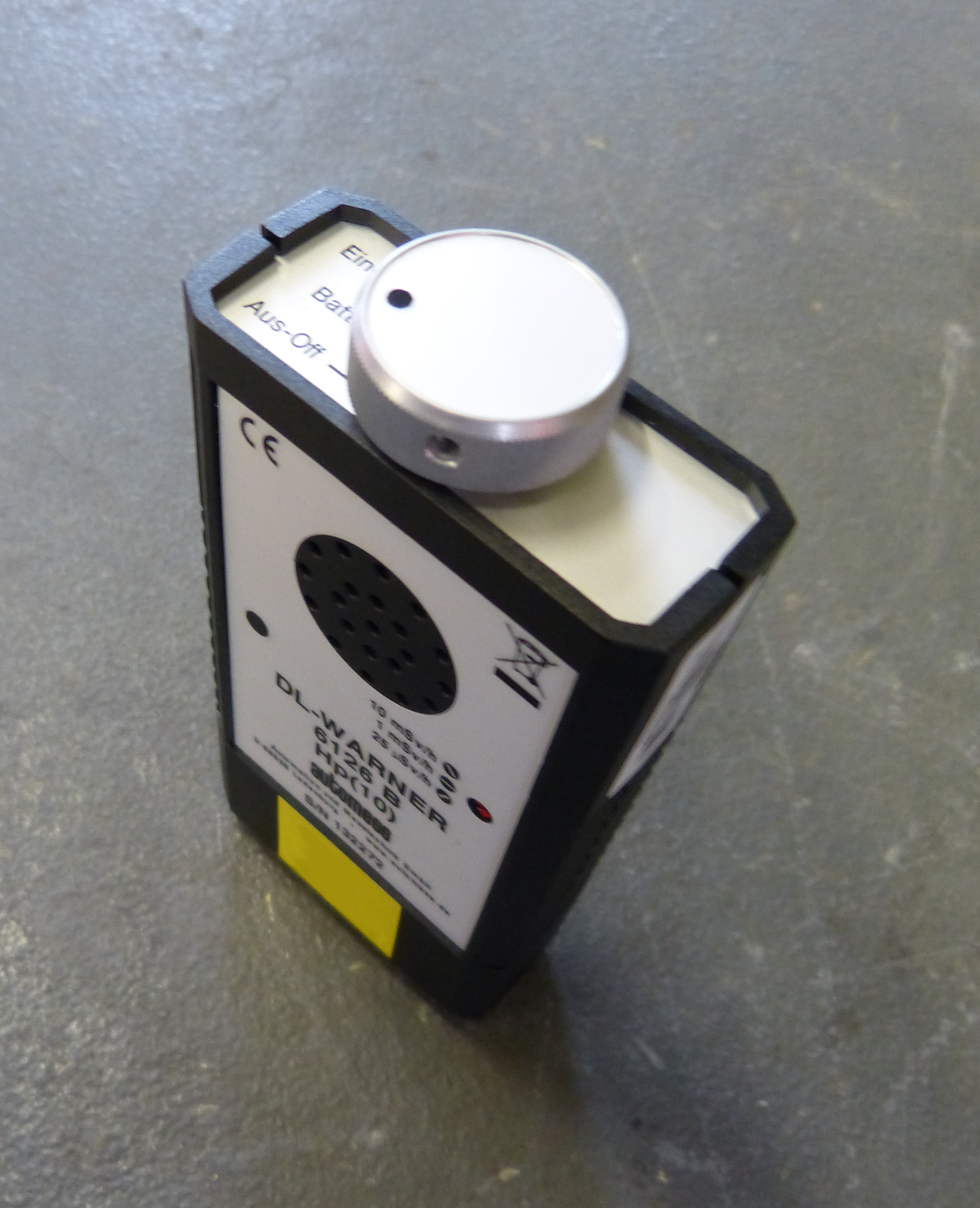 Dosis- und Dosisleistungswarngerät, Messgerät zur Festlegung der Gefahrenbereichsgrenze für Einsatzkräfte im Strahlenschutzeinsatz.